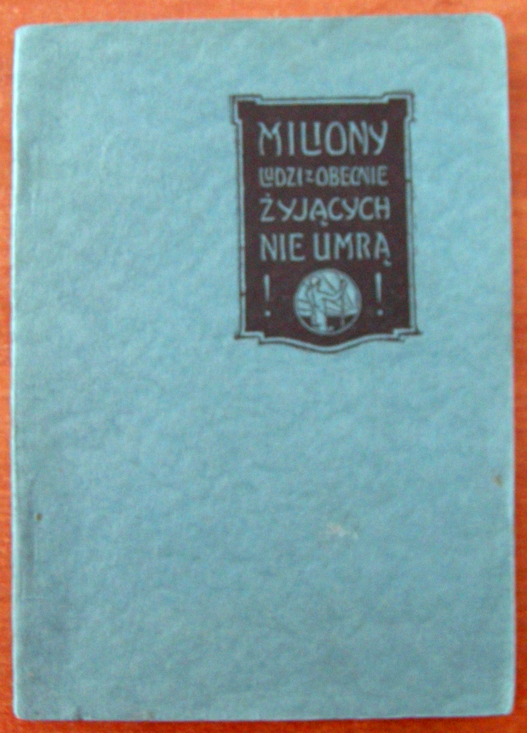 Publikacja "Miliony ludzi z obecnie żyjących nigdy nie umrą!" z 1920 roku w języku polskim. Zdjęcie okładki.